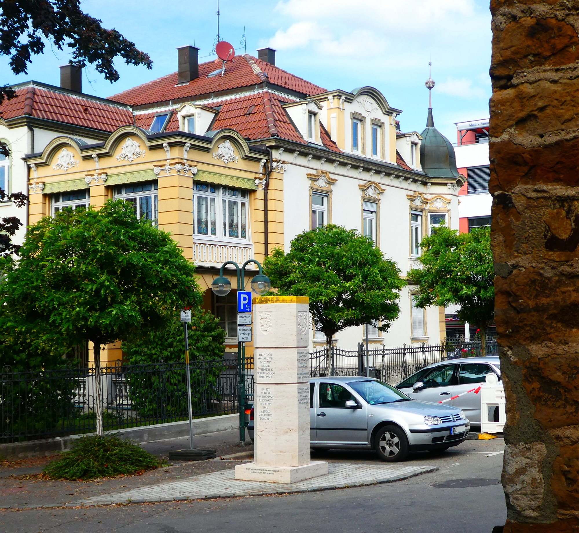 Stauferstele des Bildhauers Markus Wolf, die am 21. September 2018 in Reutlingen an der Ecke Zeughaus-/Mauerstraße eingeweiht wurde